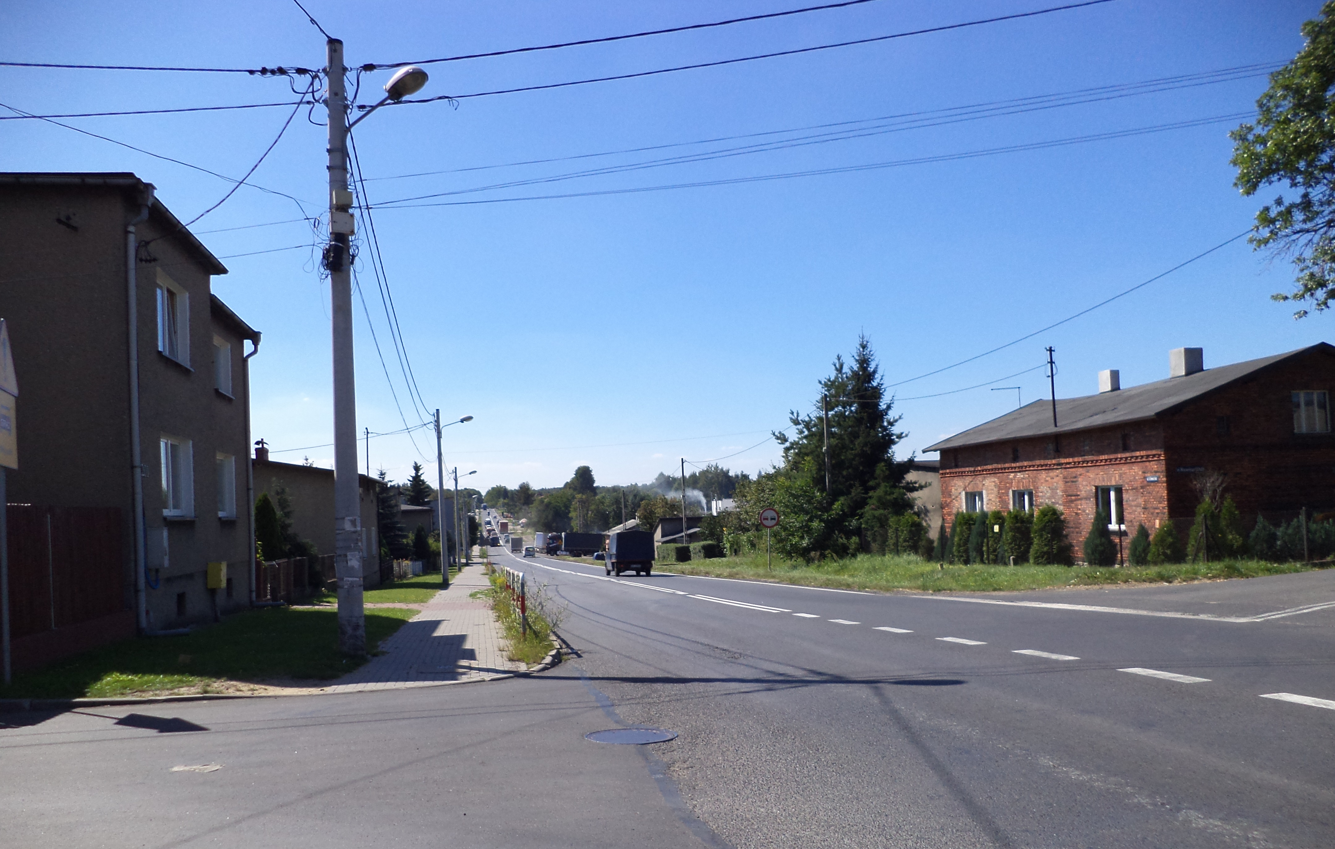 Ulica Gliwicka w Tarnowskich Górach-Reptach Śląskich - część drogi krajowej nr 78